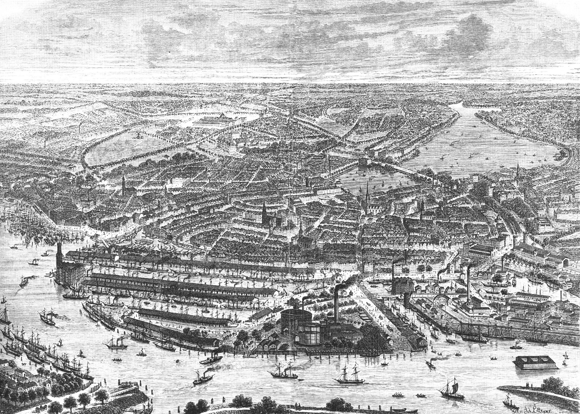 Xylographie nach einer Zeichnung von Adolf Eltzner